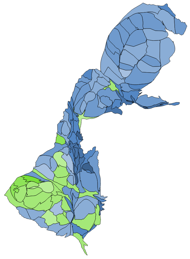 顏色對照表